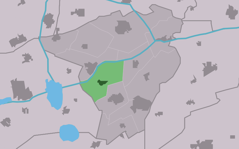 Kaartsje fan himrik fan Droegeham